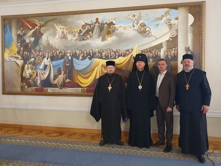 23 квітня 2019 року. Архієпископ Чернігівський і Ніжинський Євстратій (Зоря), народний депутат України Олександр Кодола, отець Сергій Чечин, отець Олег Расковалов у Верховній Раді України після брифінгу з приводу передачі храму Іоана Богослова православній громаді міста Ніжина (Православній церкві України)